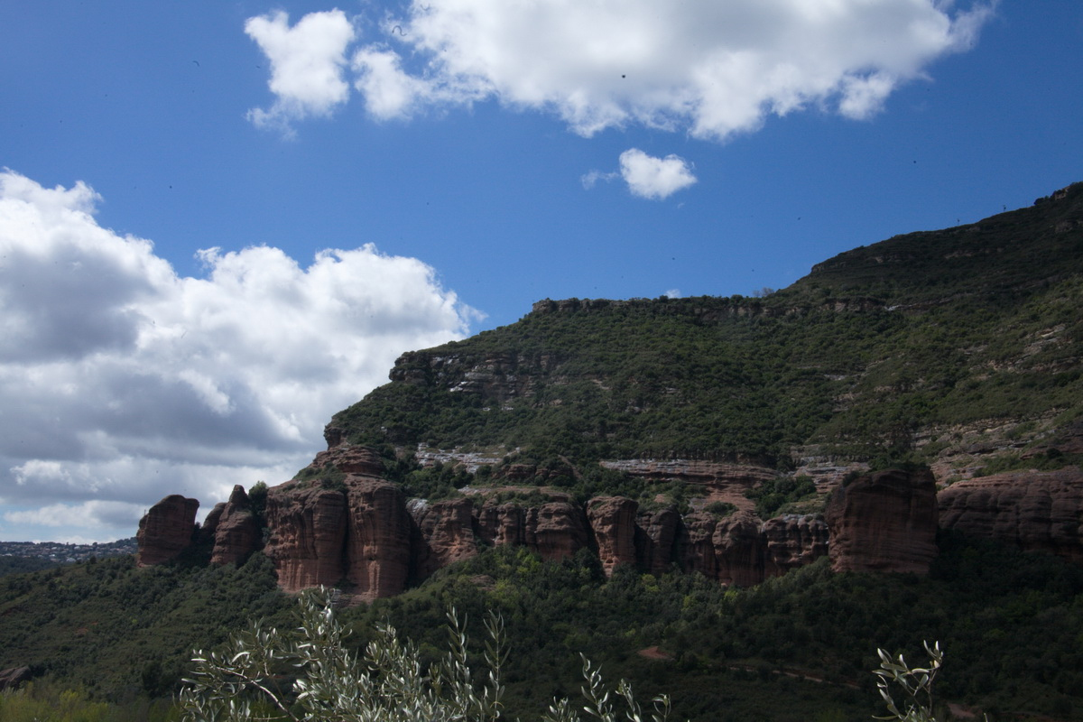 Cingles del Perer a Riells del Fai